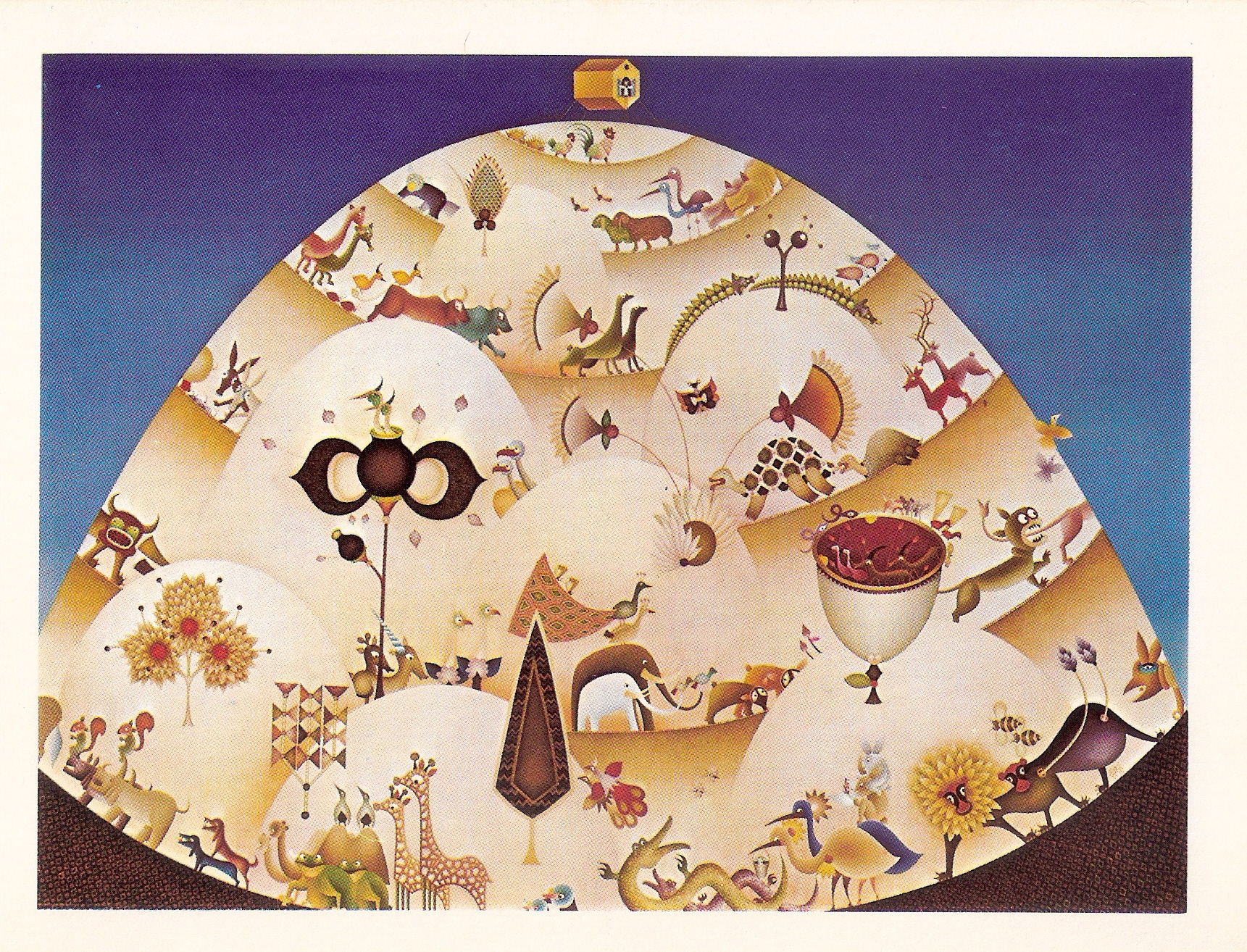 הדרך אל התיבה 2